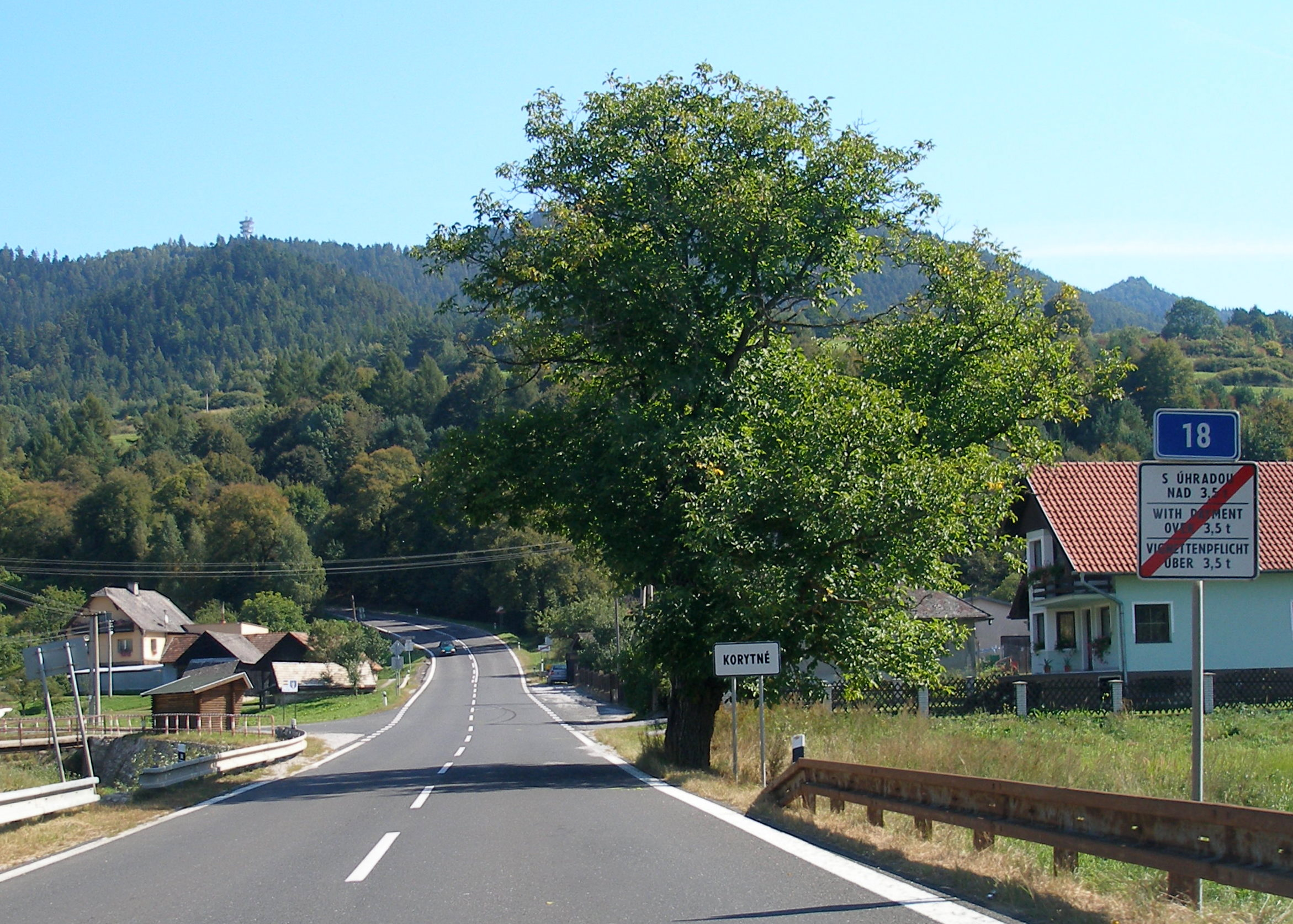 Spišská obec Korytné .